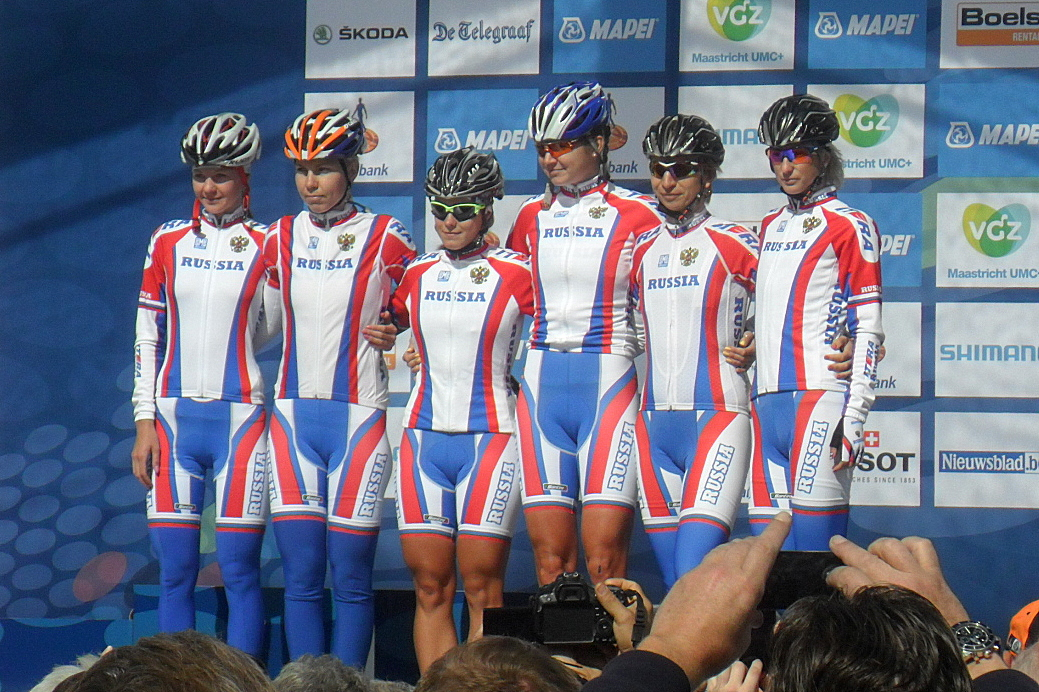 Ploegenpresentatie Rusland voor de start van het Wereldkampioenschap 2012 in Valkenburg, Nederland.